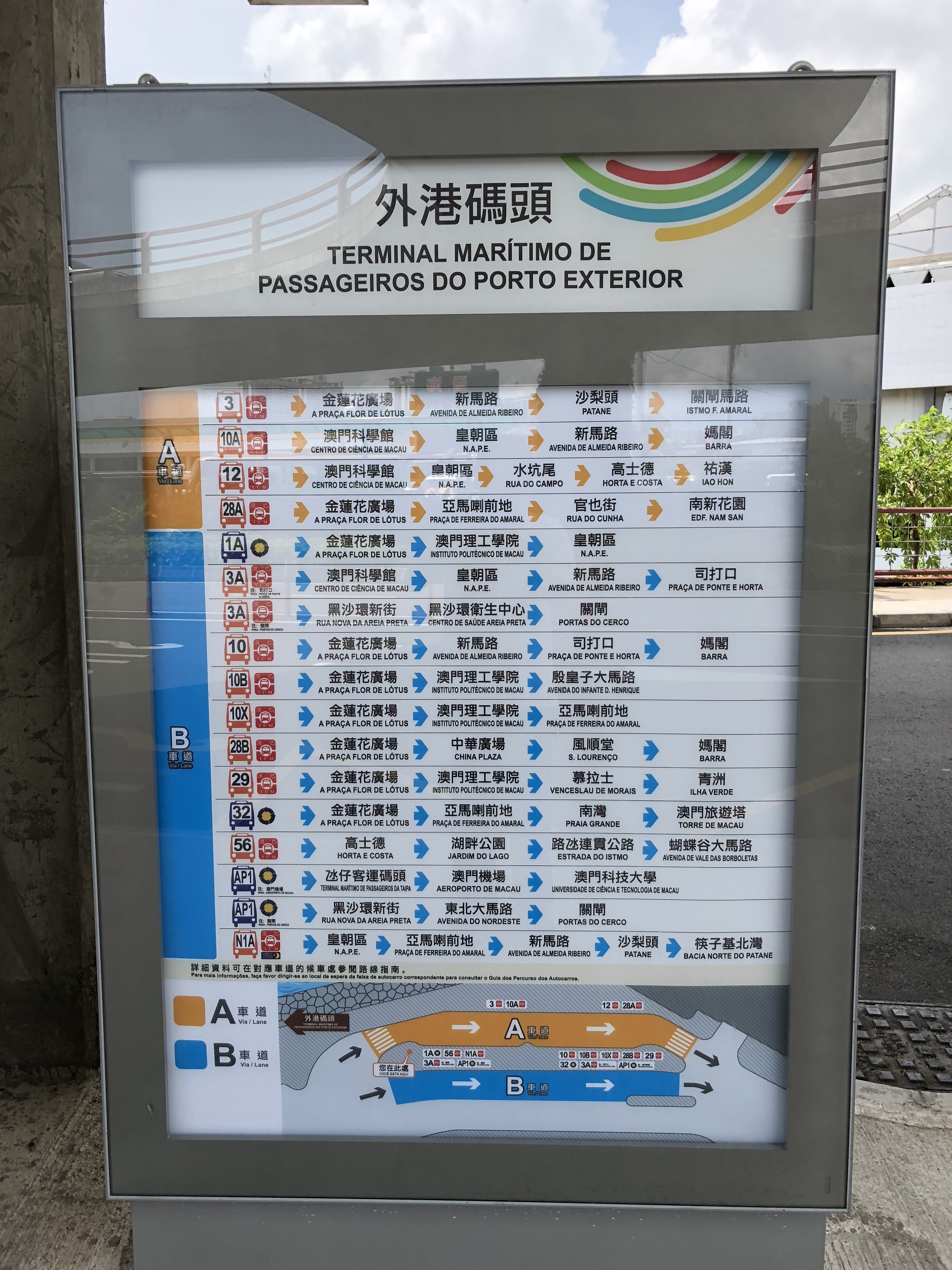 兩巴合併後的外港碼頭站新行車指示牌.